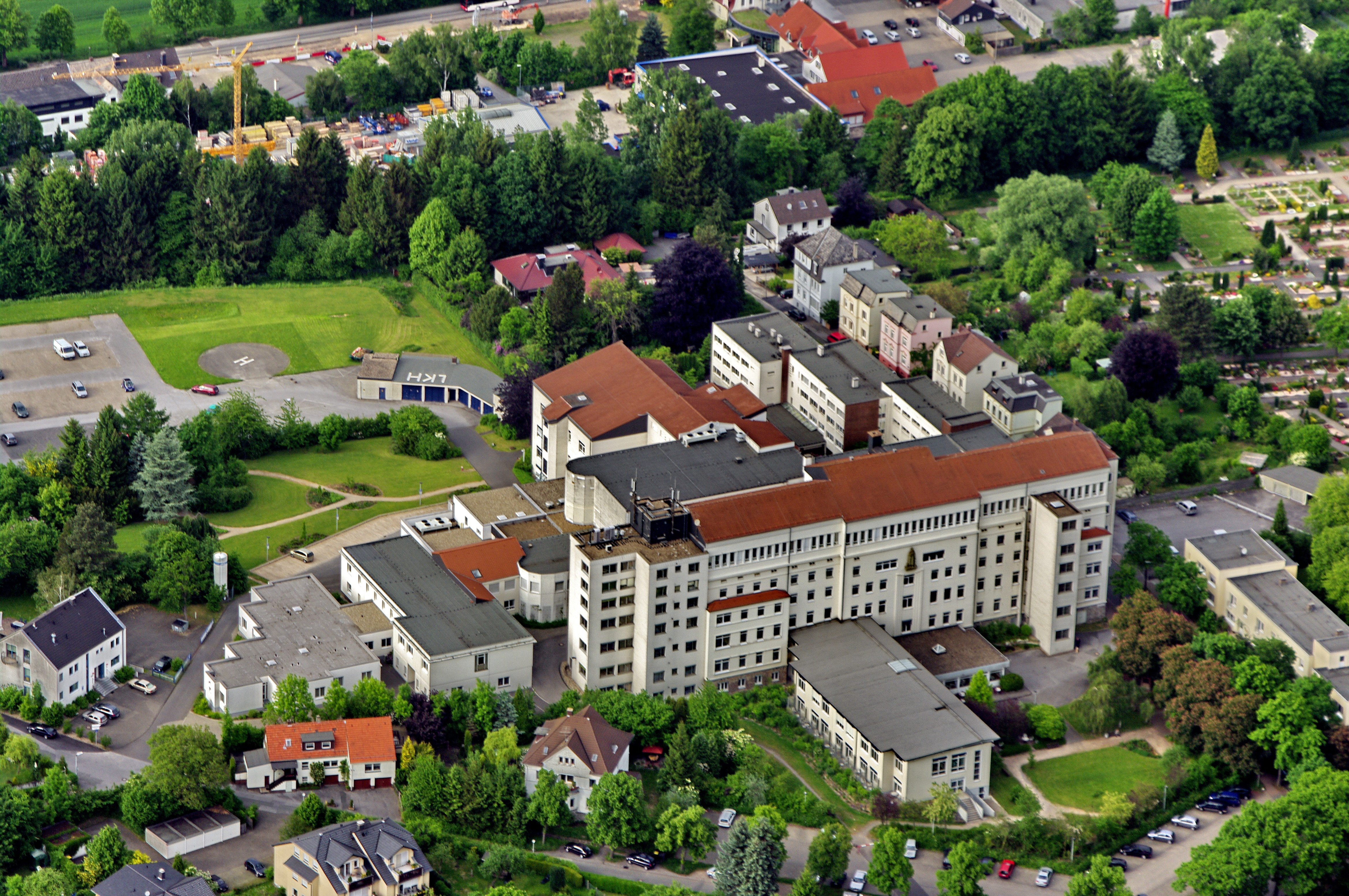 Lungenklinik Hemer, Germany